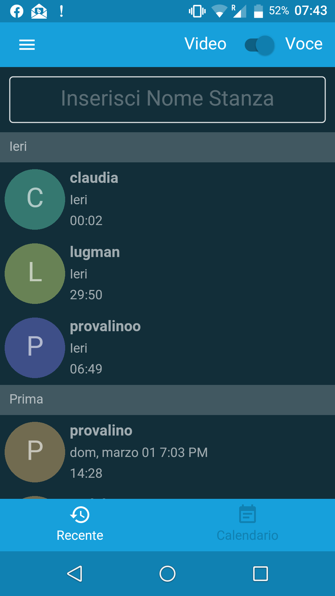 Home della App di Jitsi